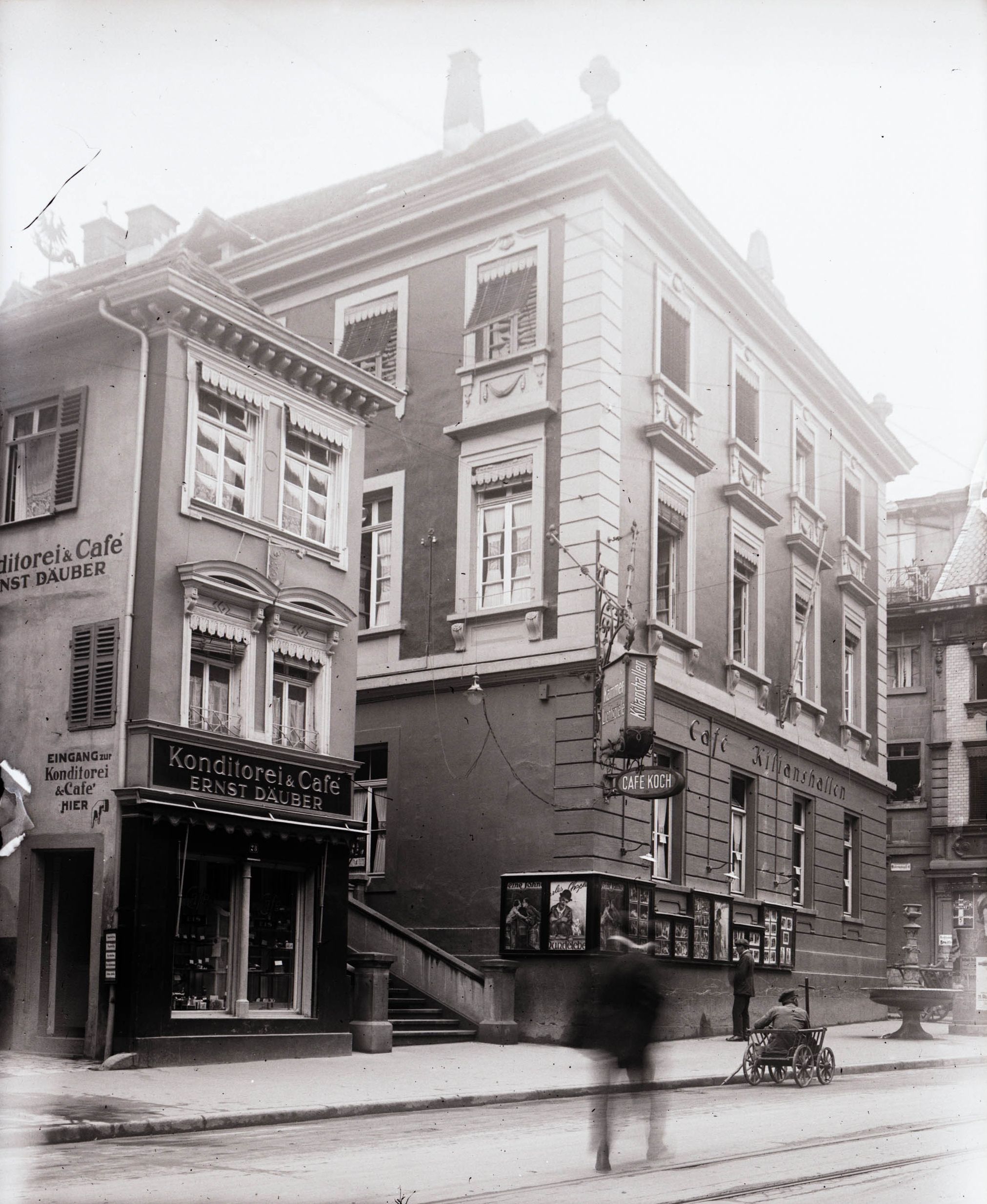 Haus Fleiner Straße 26 in Heilbronn mit dem Café Kilianshallen und den 1919 eröffneten[1][2] Kammer-Lichtspielen, die Ein Hundeleben von Charles Chaplin und Seine Söhne zeigen. Links daneben das Gebäude Fleiner Straße 28 mit Konditorei & Café Ernst Däuber.[3]